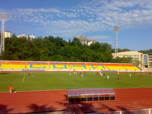 Футбольный матч: Жемчужина - Краснодар-2000